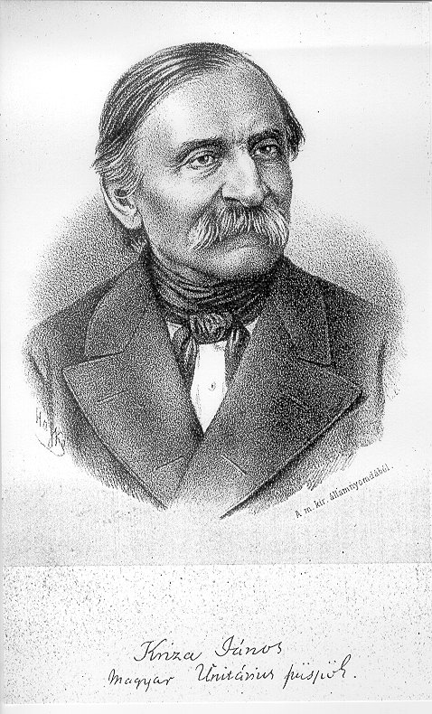 Kriza János (Nagyajta, 1811. június 28. – Kolozsvár, 1875. március 26.) néprajzkutató, költő, műfordító, unitárius püspök, a Magyar Tudományos Akadémia tagja.